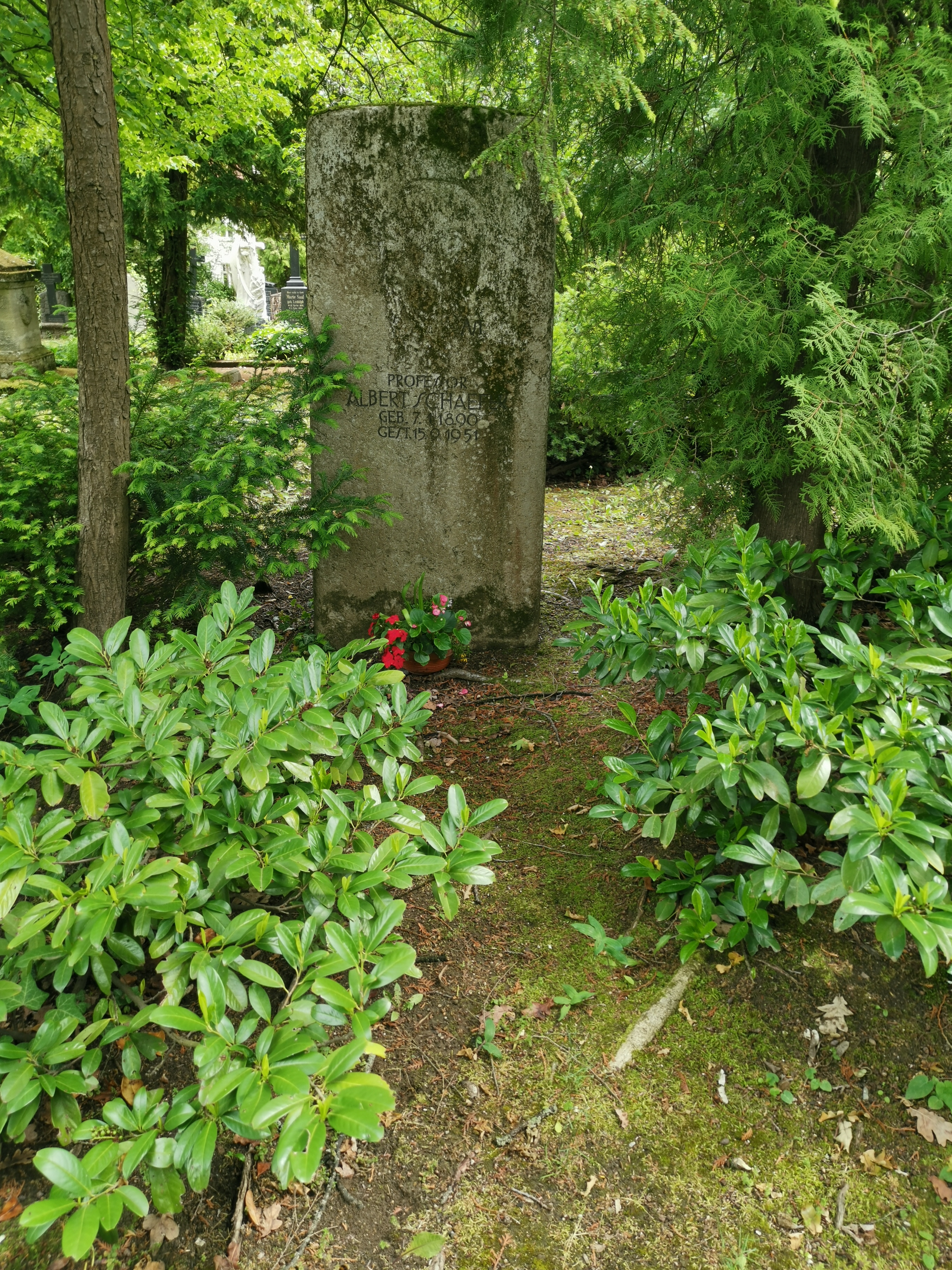 Grabstätte Albert Schaefer-Ast; Historischer Friedhof Weimar